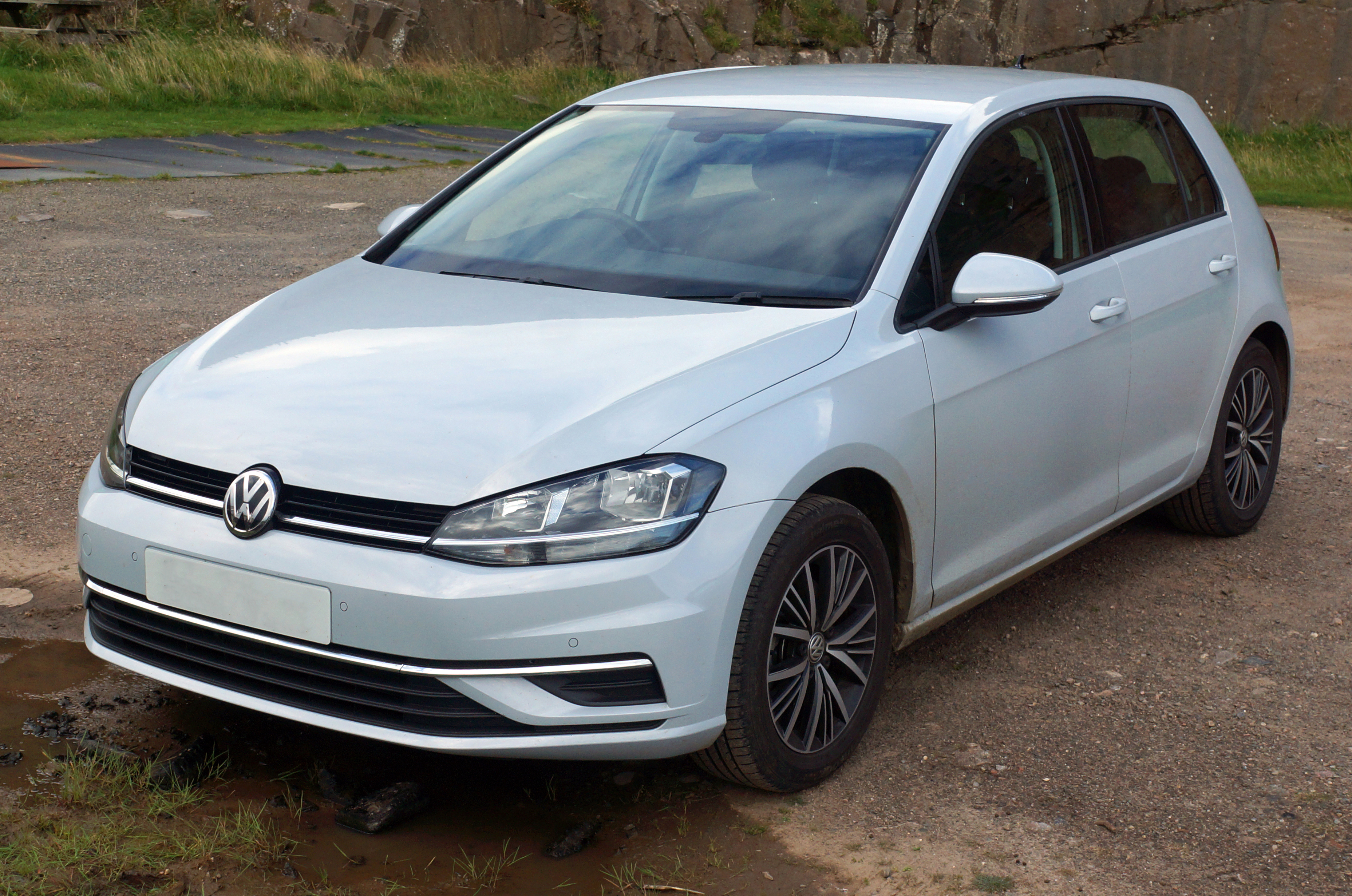 2017 Volkswagen Golf (5G MY17) 1.4 SE TSI hatchback